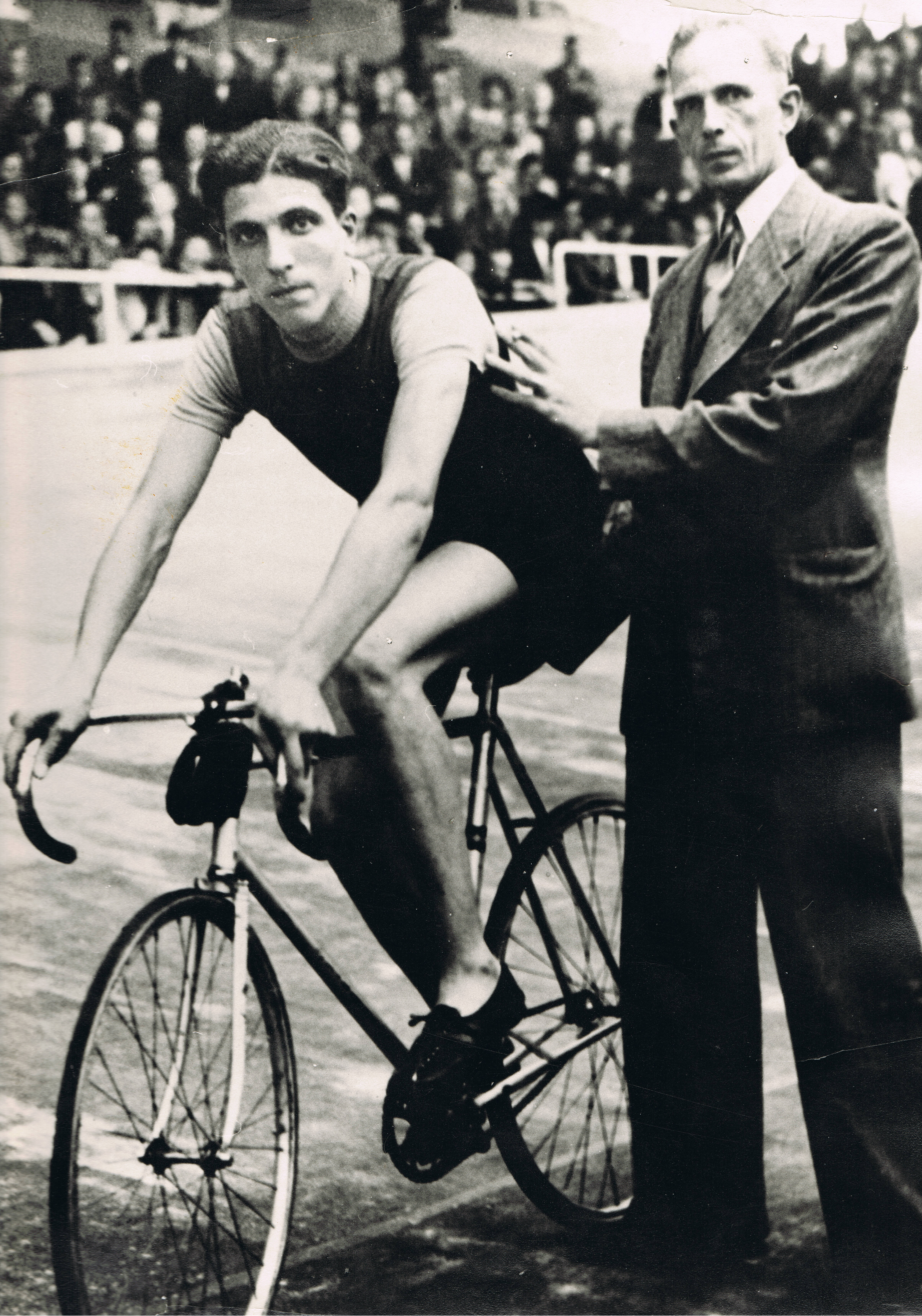 Start van Ge Peters op de zesdaagse Antwerpen. Begeleider zijn vader Anton Peters.